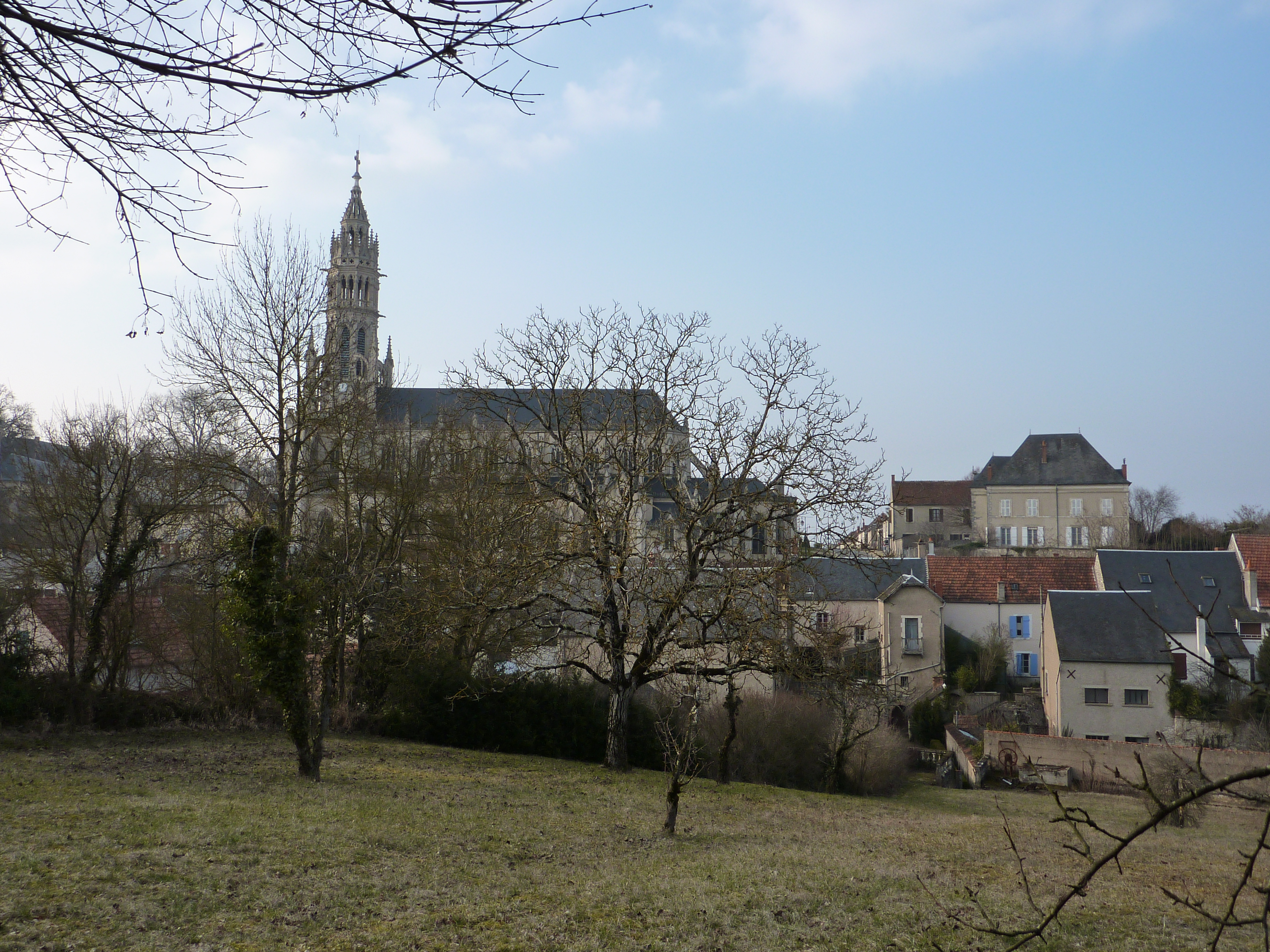 Basilique Notre-Dame des Enfants de Châteauneuf-sur-Cher (18)